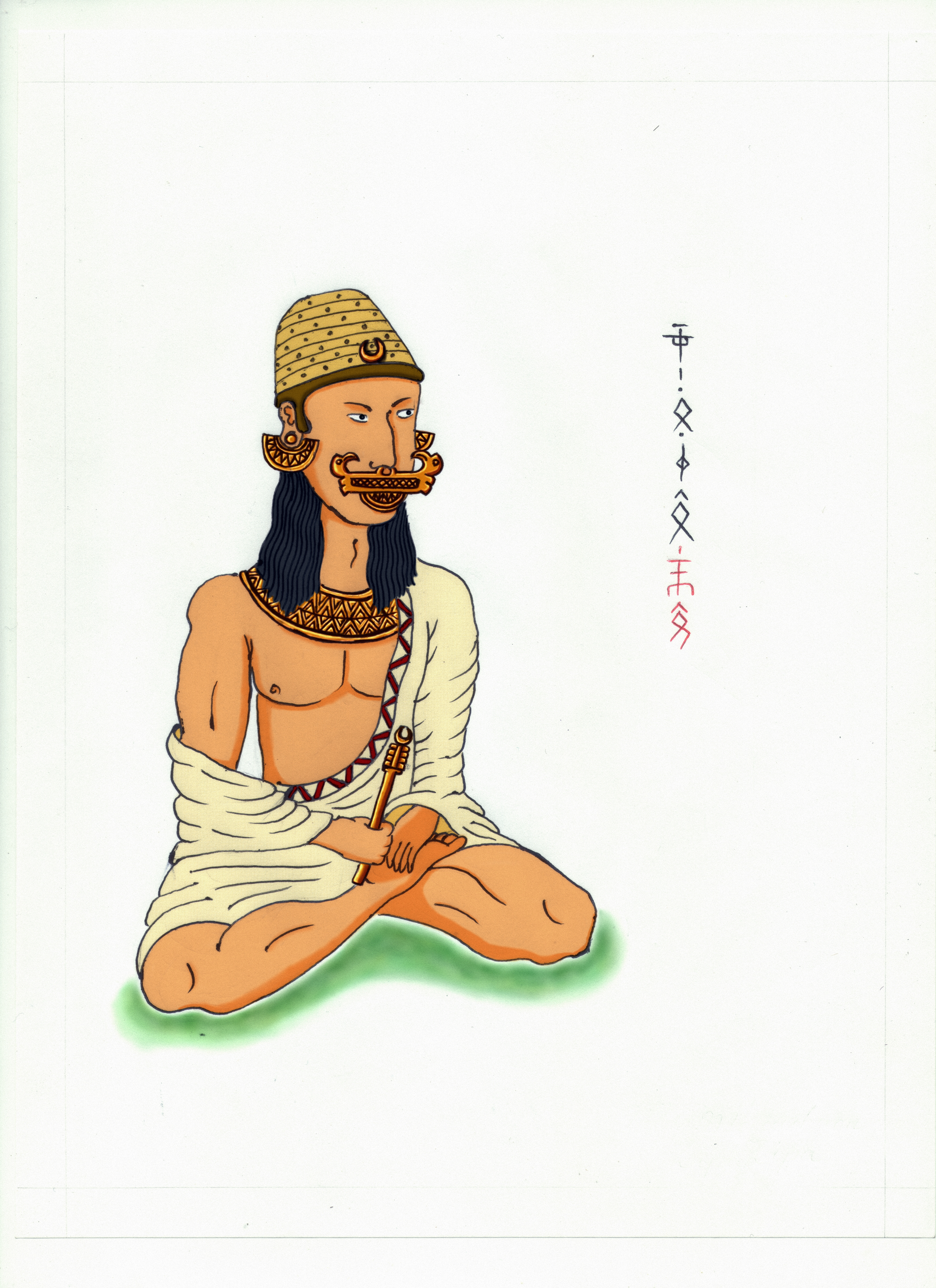 Ilustración del Zipa Meicuchuca.